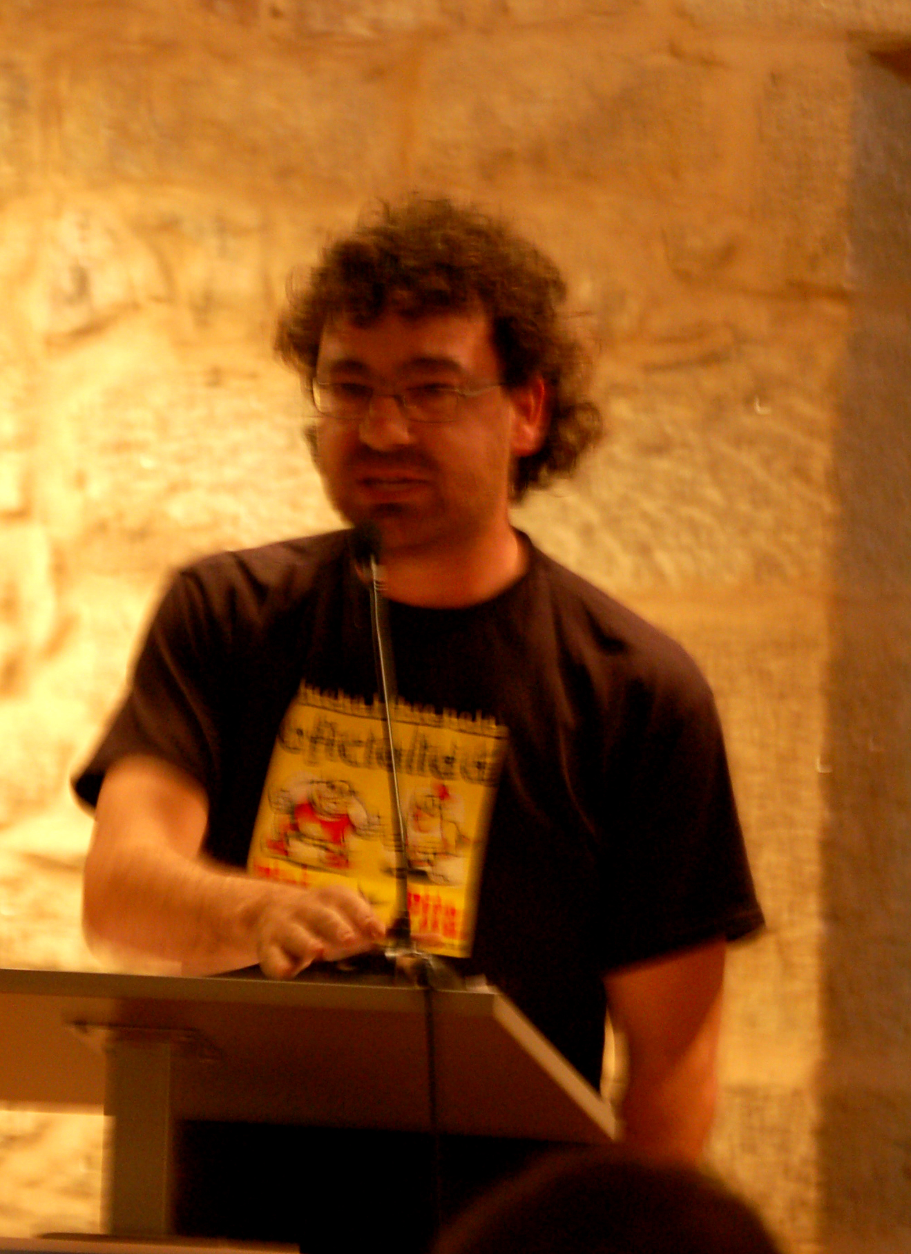 Séchu Sende recitando no II Festival de Poesía Galega Contemporánea Poïética en Casal de Ferreirós (Poio)